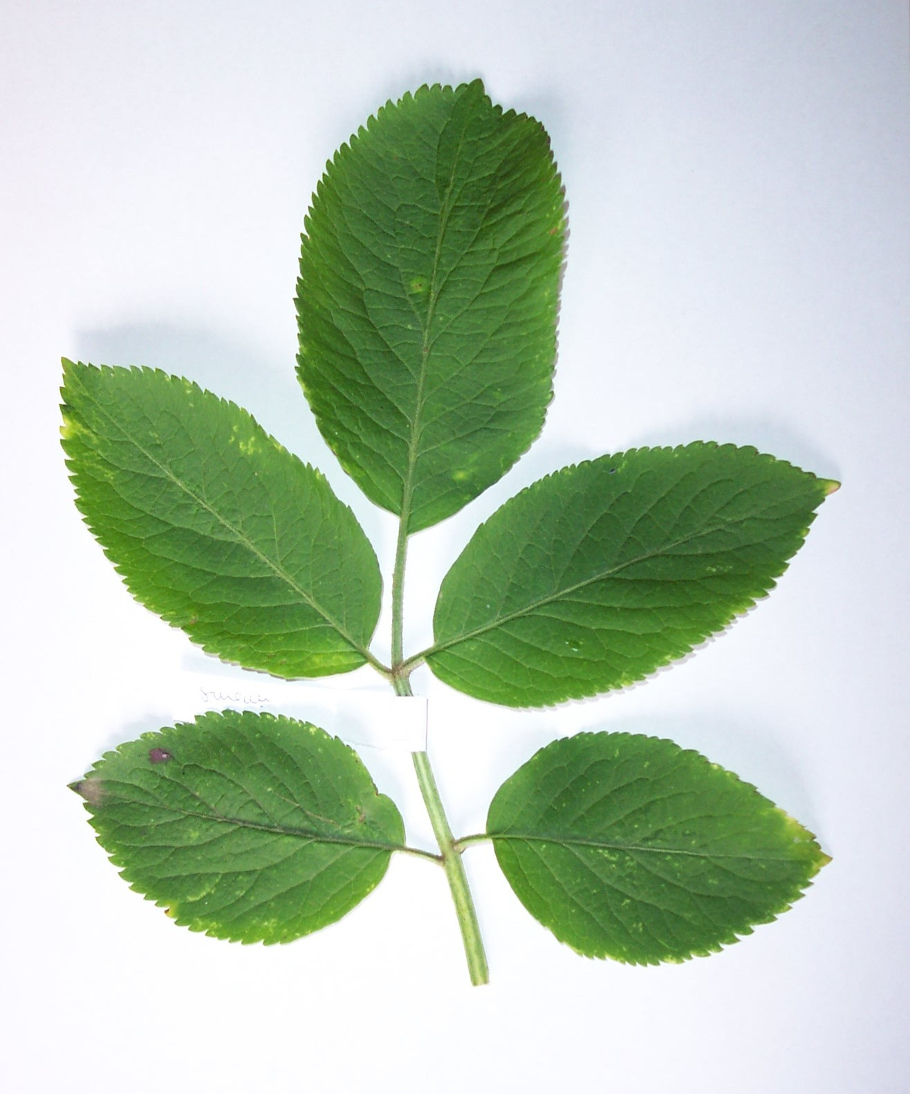 Grand Sureau ou Sureau noir (Sambucus nigra